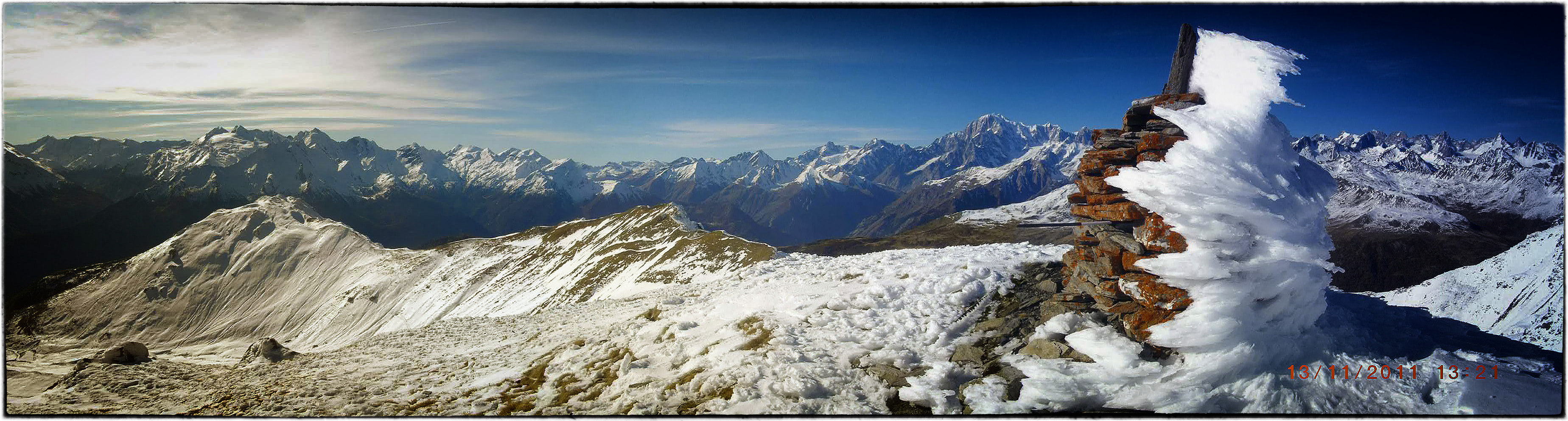 Panoramica dal Rutor alle Grandes Jorasses con al centro il «Re bianco delle Alpi» (i.e. il massiccio del Monte Bianco), la "cattedrale di roccia" più alta (4810,44 mslm) dell' arco alpino tra le 82 vette sopra i 4000 m (fonte UIAA-1993); con la sua vetta granitica soprannominata il Tetto delle Alpi rappresenta l' archeomonumento alpino per antonomasia, collocata in posizione baricentrica al perimetro italo-franco-svizzero dell' Espace Mont-Blanc (EMB) o "spazio bianco". Periodo : Autunno del 2011 - estate di San Martino. Luogo : punta Leysser (2771 m) raggiungibile da Vetan , frazione del Comune di Saint Pierre (Aosta) - Italy . Per approfondimenti : Per info : This is a photo of a monument which is part of cultural heritage of Italy.